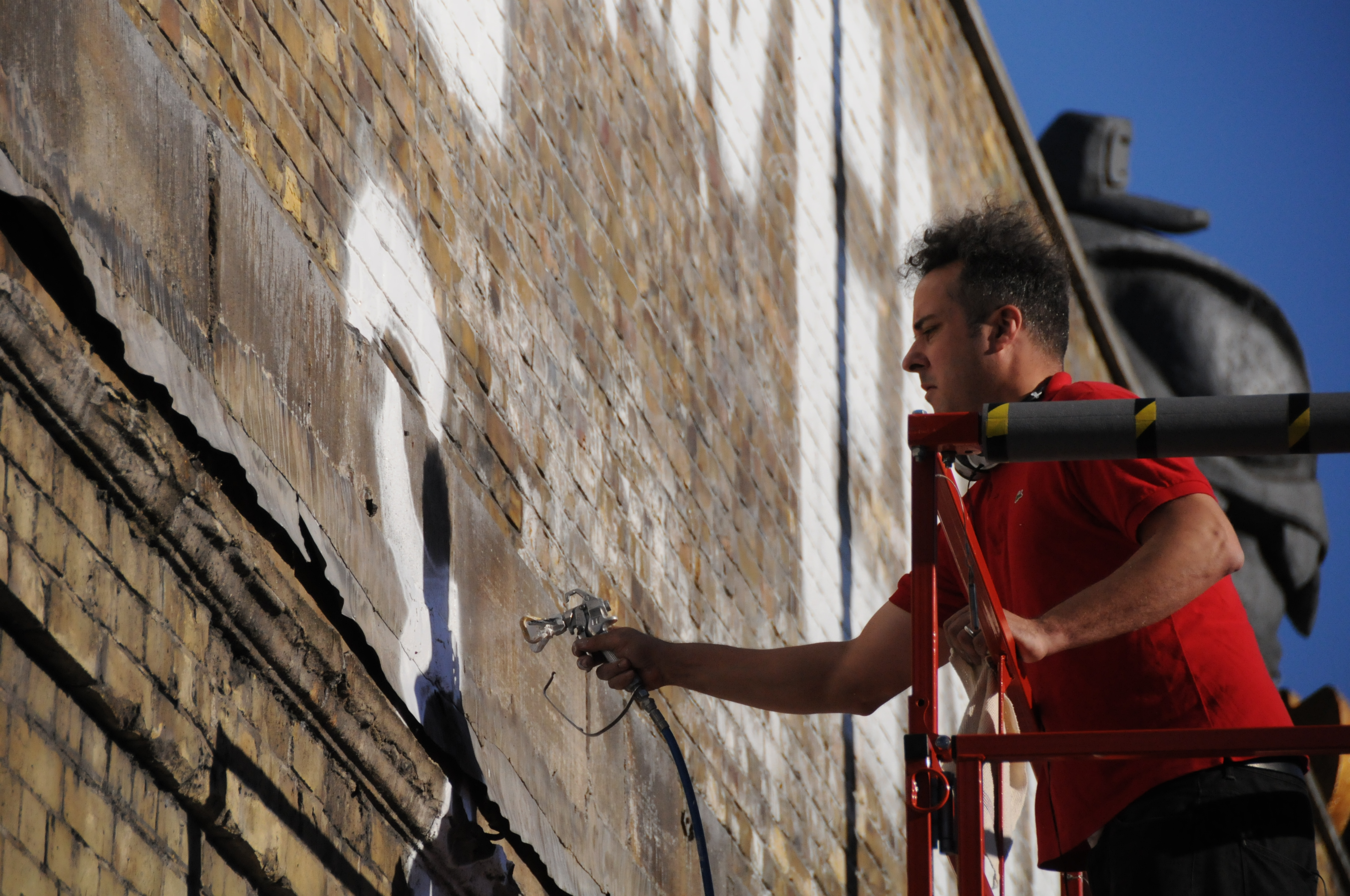 Steve Powers at Moniker